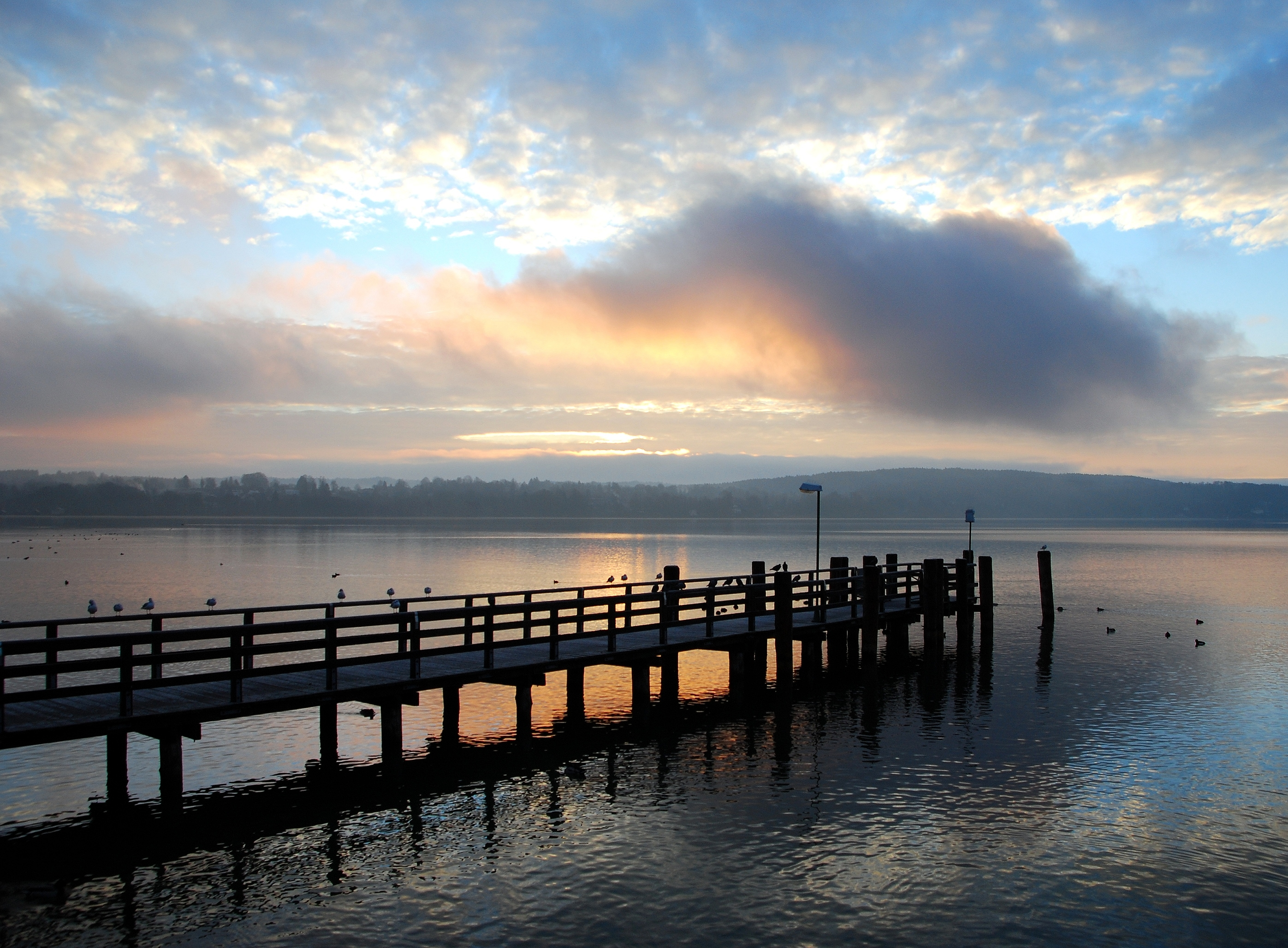 Starnberg, Sonnenaufgang über dem Dampfersteg.